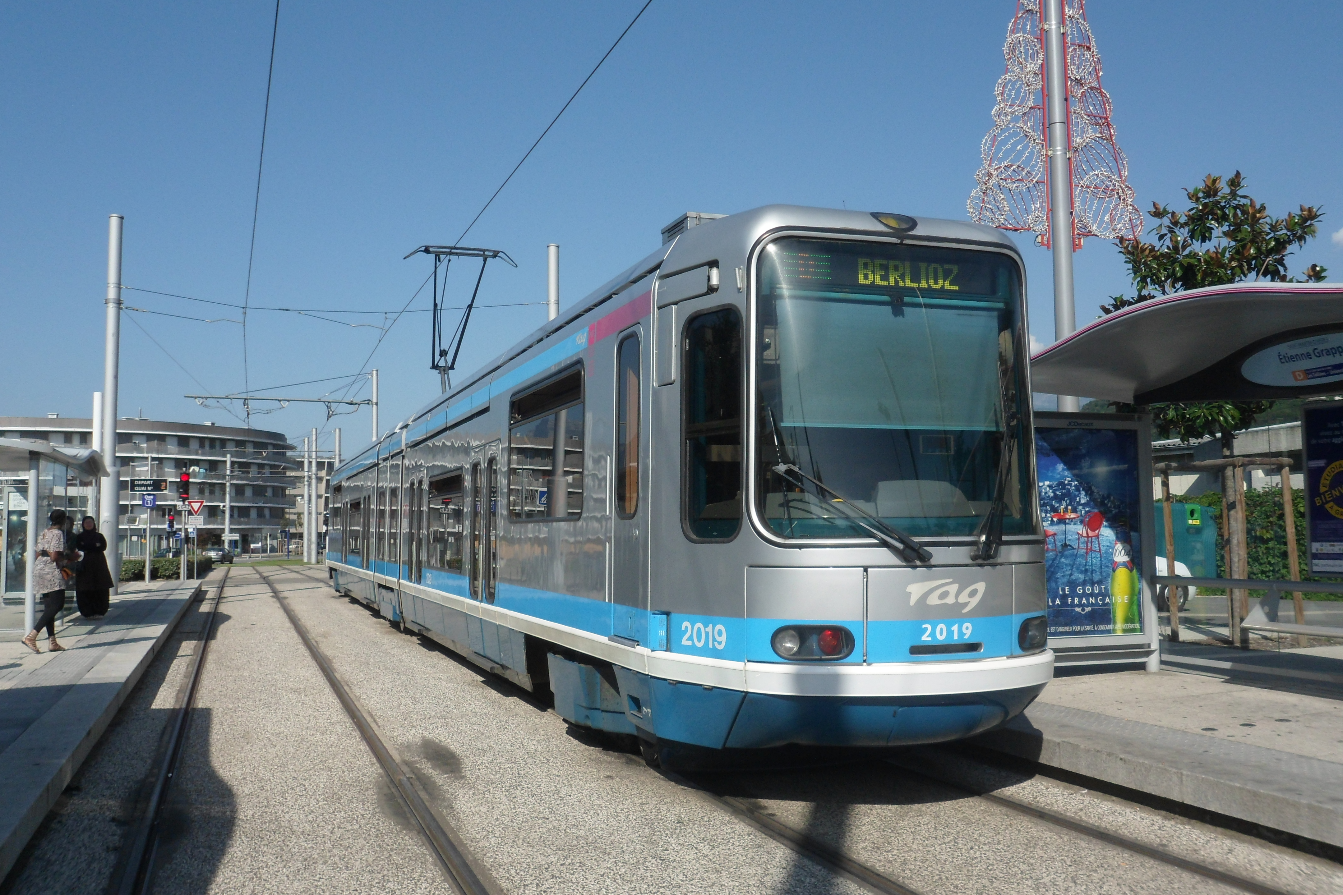 Alsthom TFS - Réseau TAG - Grenoble. Ligne D à la station Étienne Grappe à Saint-Martin-d'Hères